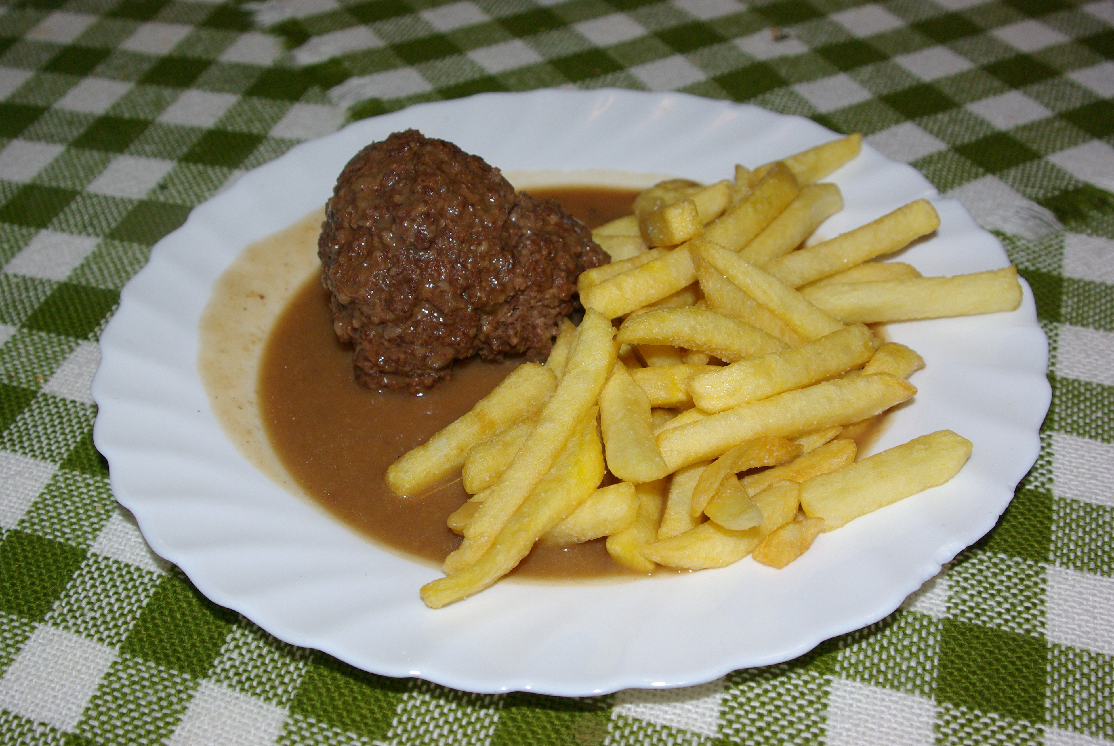 Pferdeklops mit Pommes Traditionsgericht in der altfuldischen Gaststätte "Zum Bratwurstglöckle" von Jacob Kern (Kern´s Jacob) in Fulda (Germany)